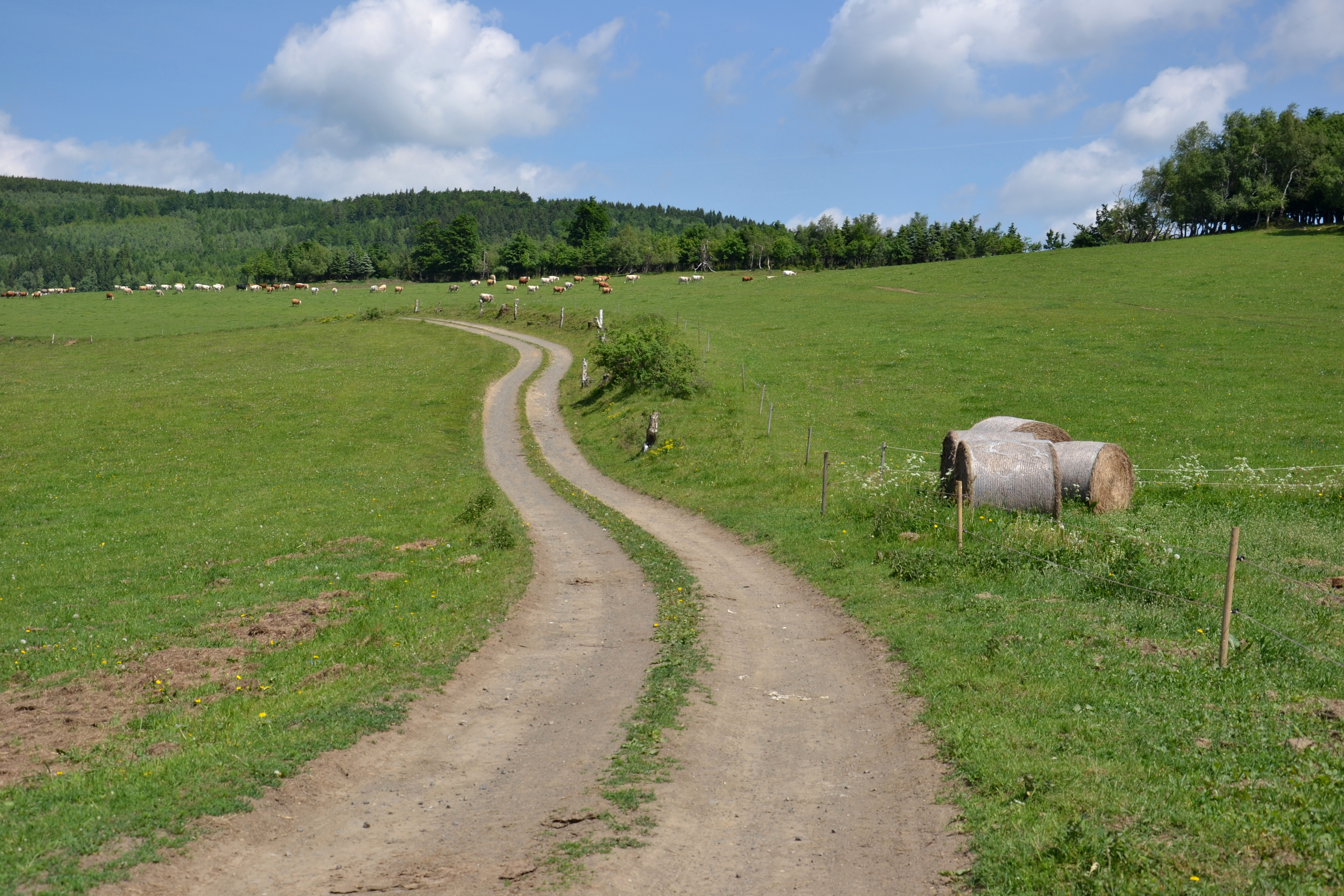 Pastviny u Srní